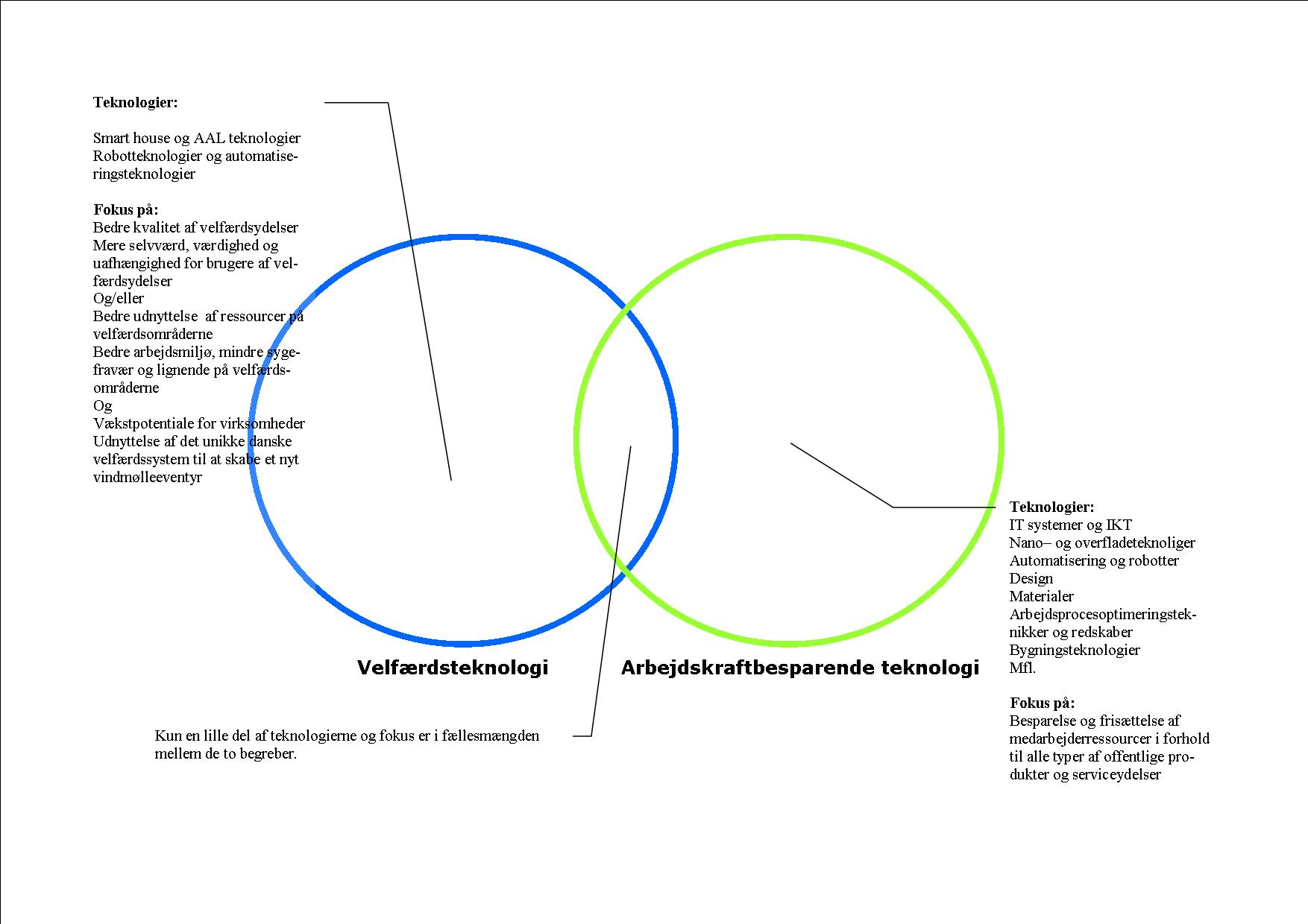 Beskriver relationen med teknologidomænebegreberne velfærdsteknologi og arbejdskraftbesparende teknologi.